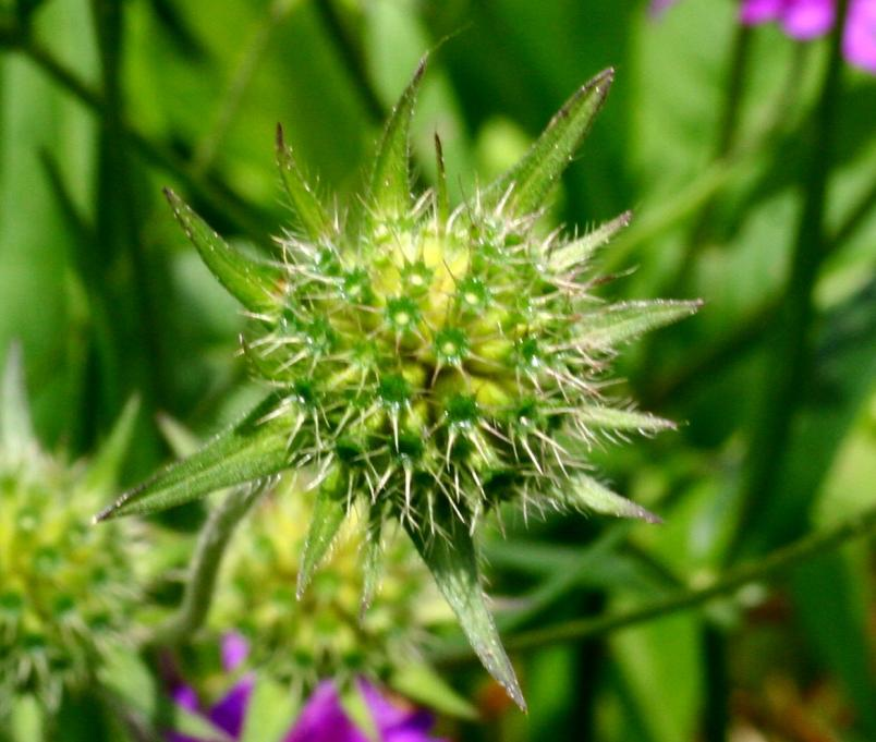 Knautia ressmannii